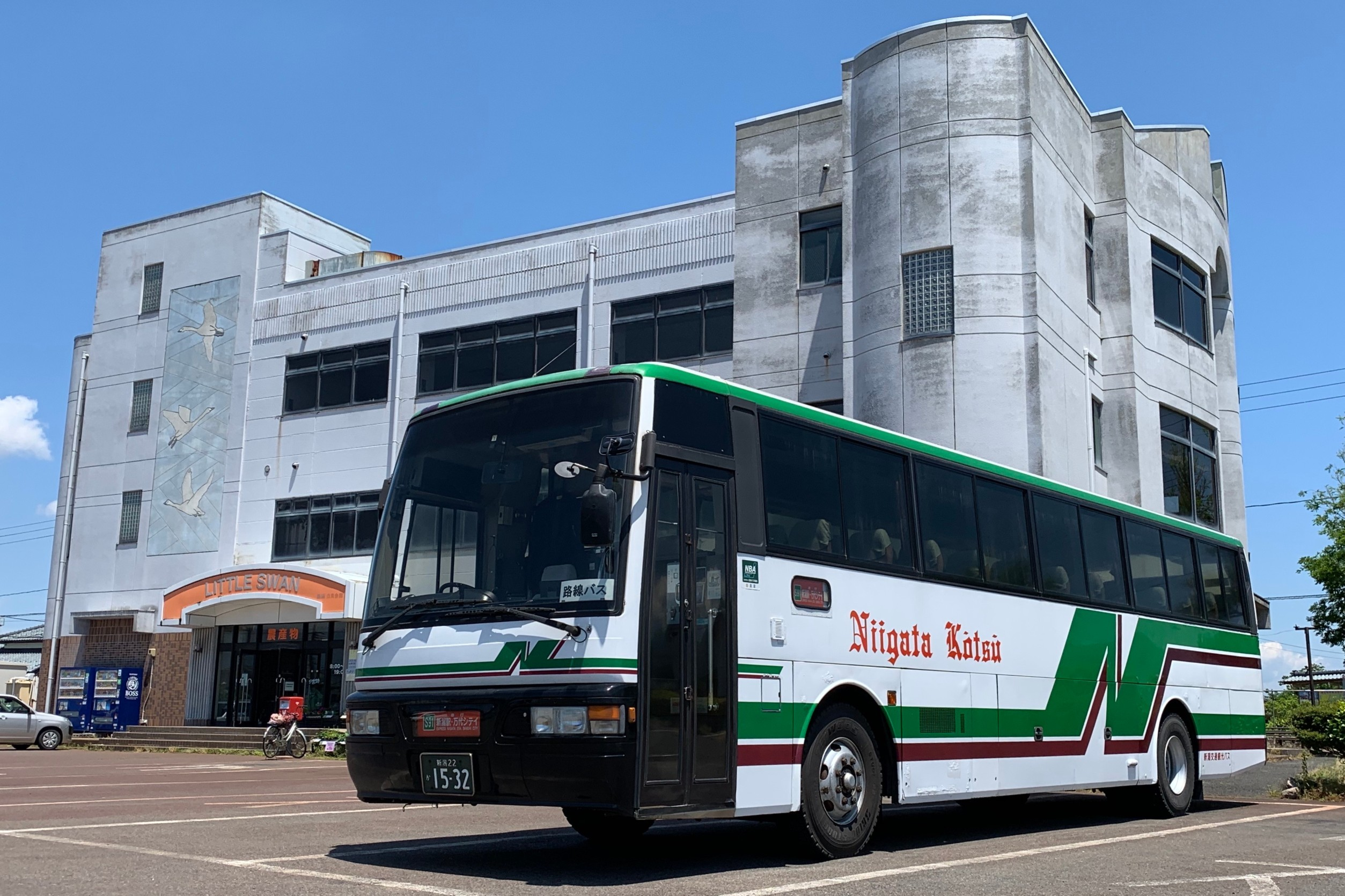 瓢湖「白鳥会館」駐車場で待機中の急行路線バス車両（2020年5月）駐車場脇に設置された「瓢湖前」バス停を発着し、万代シテイ・新潟駅 - 水原 - 瓢湖前の経路で運行される（新潟交通観光バス S9 亀田・横越線）